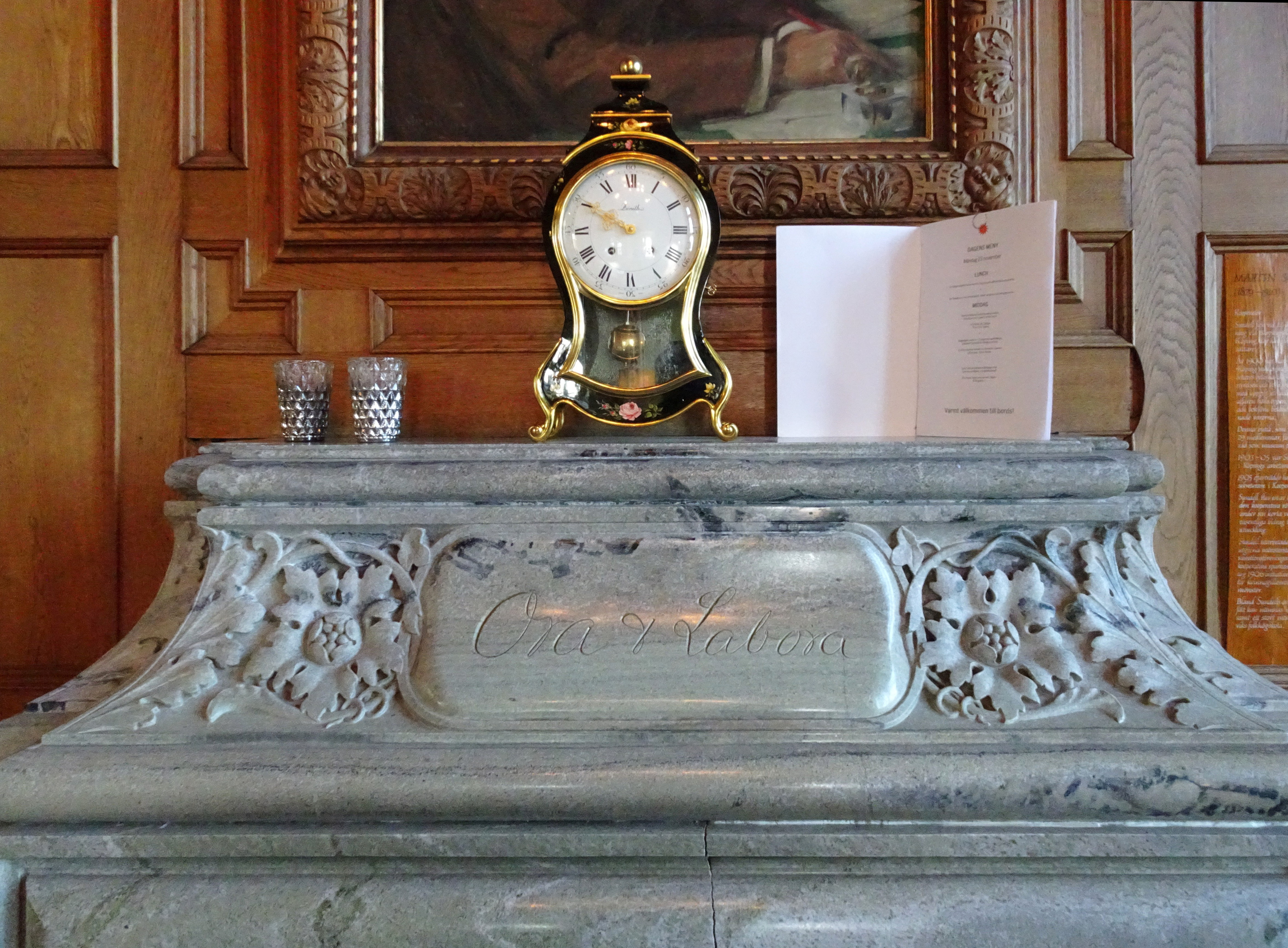 Villa Skärtofta marmorspisen i entréhallen "Ora et Labora"